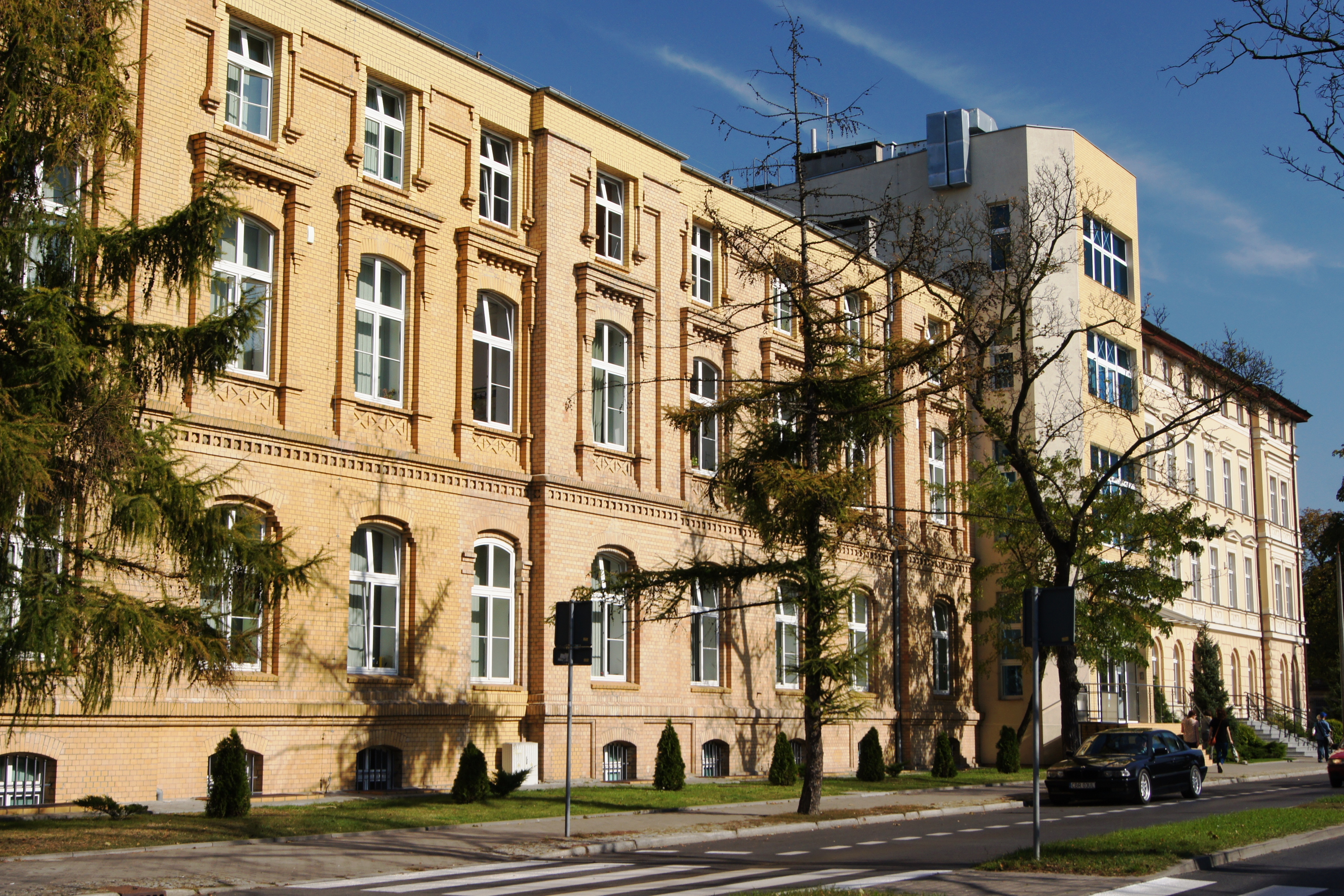 Toruń, ul. gen. J. Dąbrowskiego 4 - dawny szpital wojskowy, obecnie biblioteka, 1891-1896 (zabytek nr rejestr. A/178)